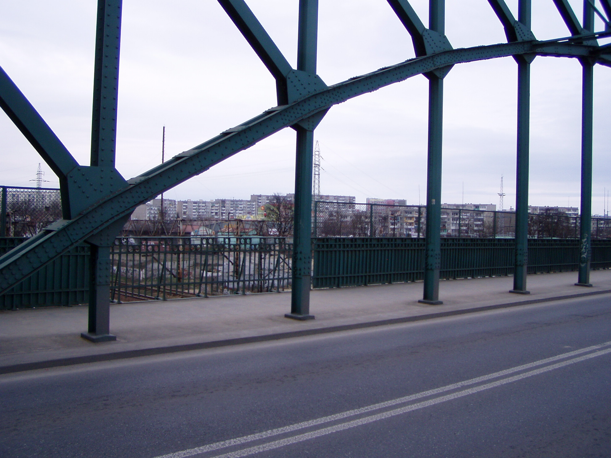 Nitowana konstrukcja mostu z 1914 w ciągu ulicy Kościuszki w Gdańskim Wrzeszczu. W tle osiedle Zaspa.